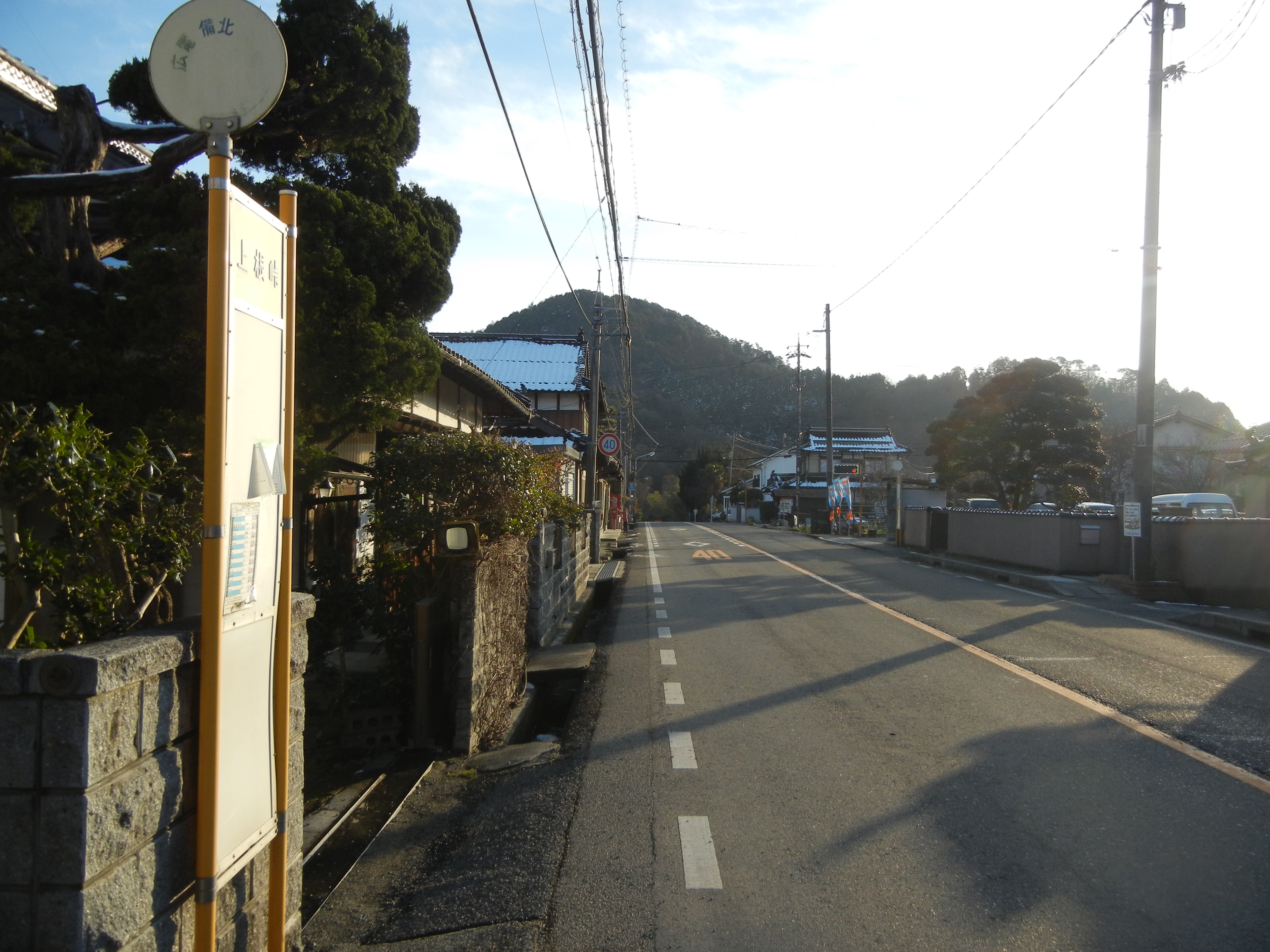 上根峠バス停